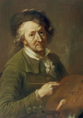 Selbstbildnis des 70-jährigen Malers Franz Ignaz Oefele aus dem Jahr 1791 mit Nürnberger Drahtbrille (Zwicker), Staffelei und Pinsel